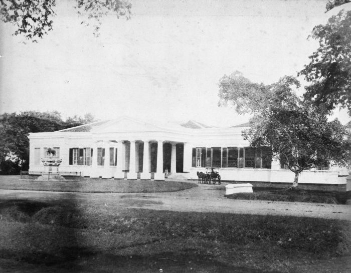 Foto. Het museum ligt aan het Koningsplein in Batavia. Het bronzen (of koperen) olifantsbeeld dat voor het gebouw staat is een geschenk van de Koning van Siam uit 1871.. Het museum van het Koninklijk Bataviaasch Genootschap van Kunsten en Wetenschappen, Batavia